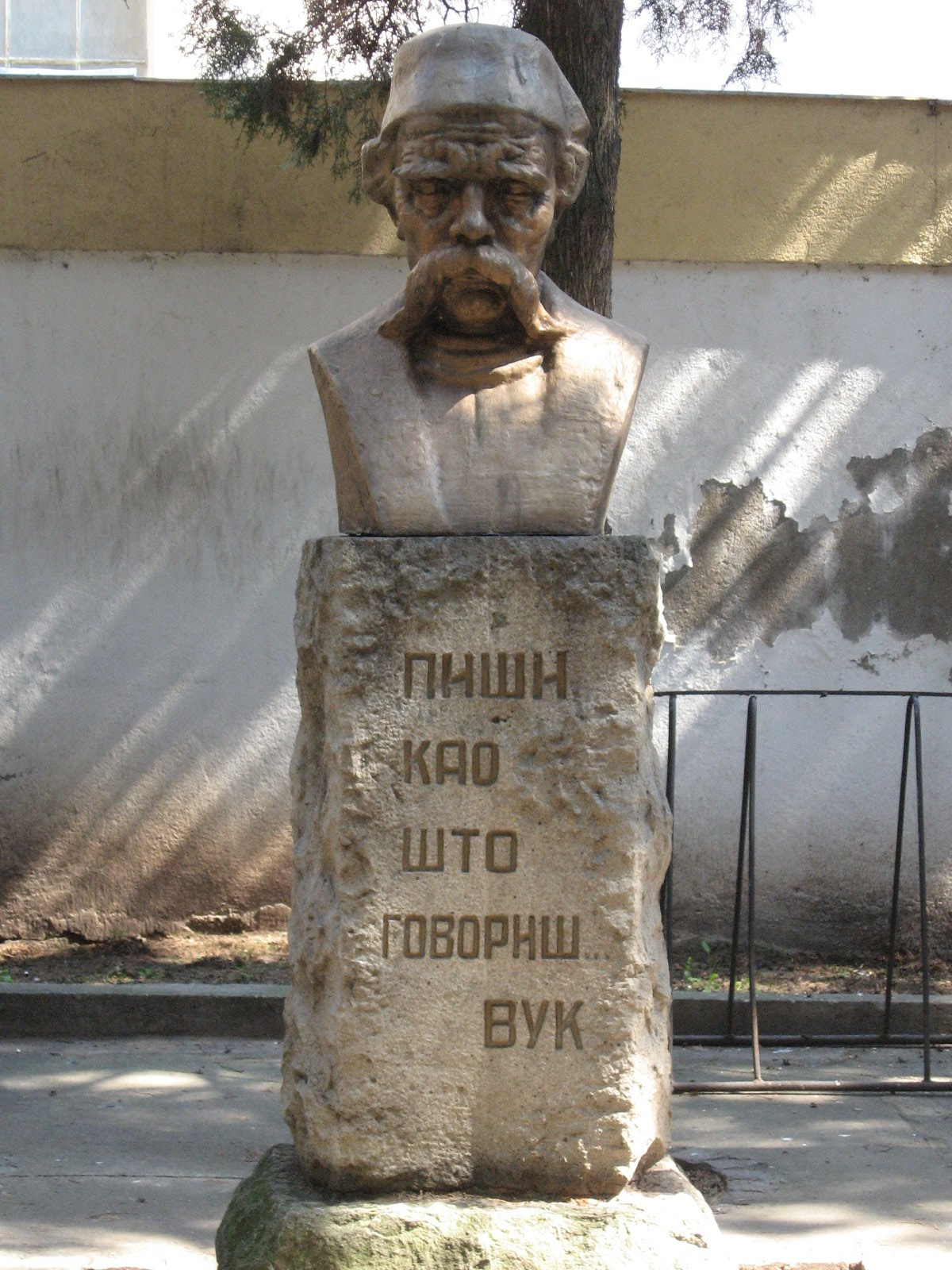 Вуков споменик у дворишту Народне библиотеке. Снимљено у априлу 2010.